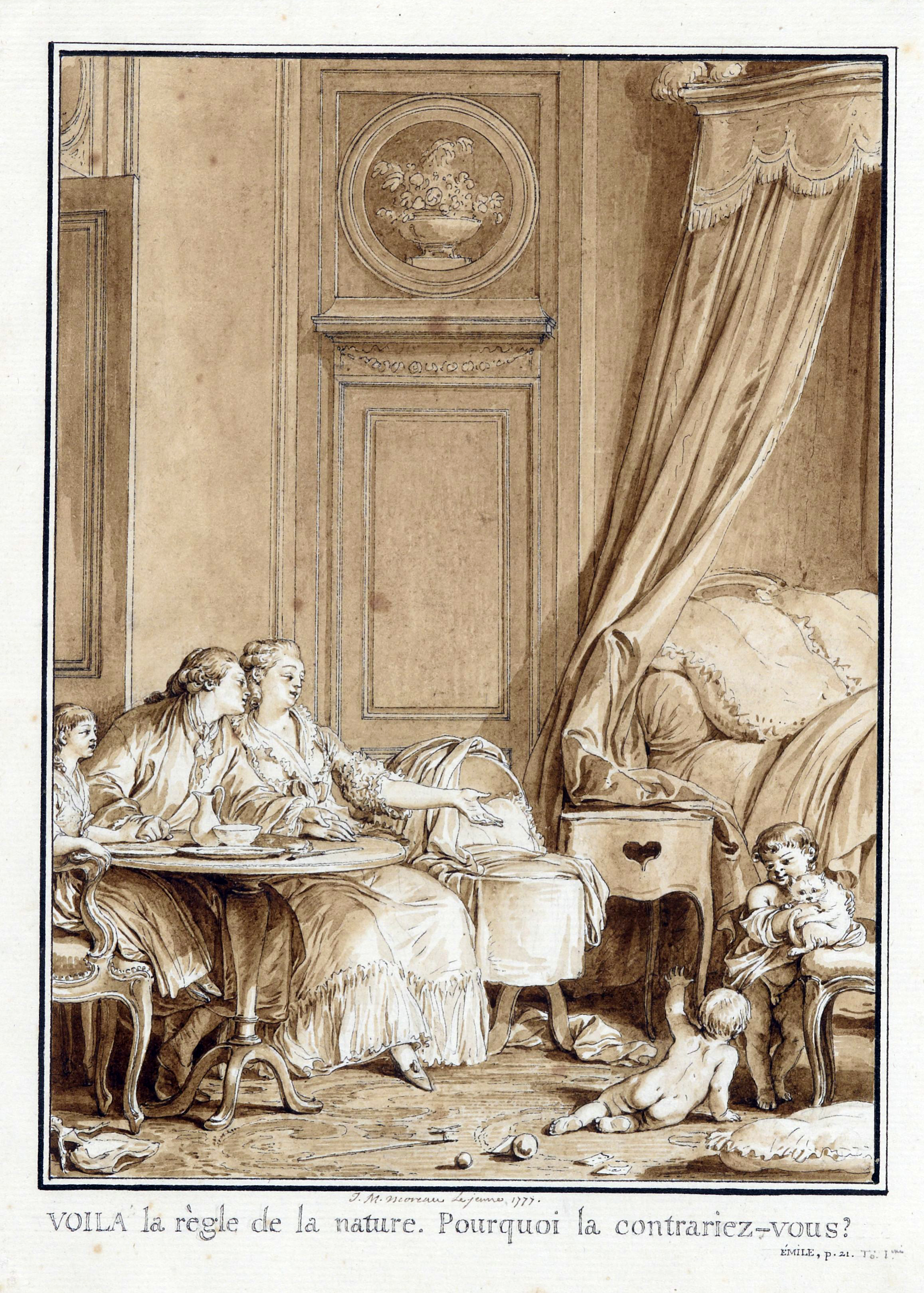 Illustration de l'Emile de Jean-Jacques Rousseau. Edition de Londres.